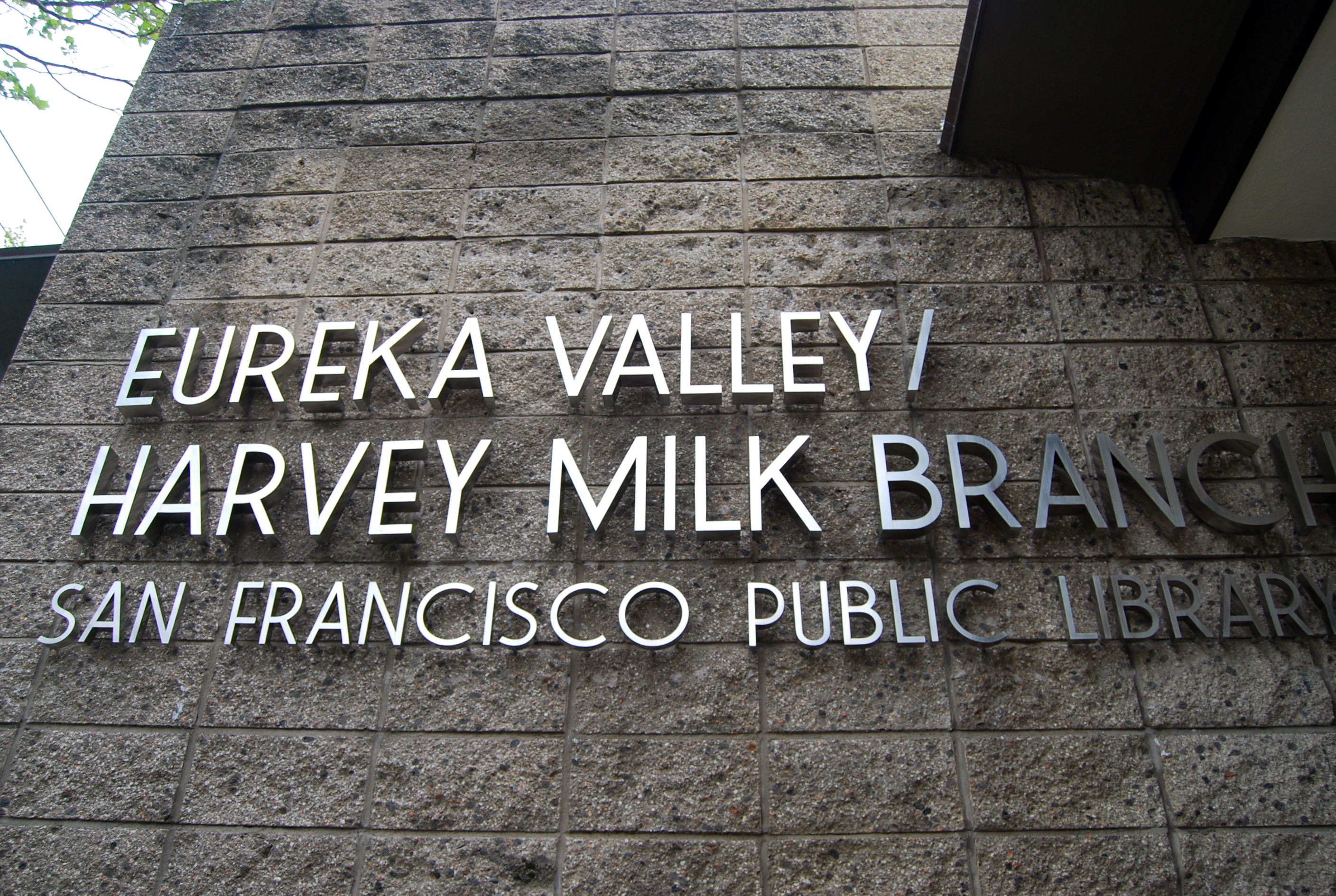 Eureka Valley sign